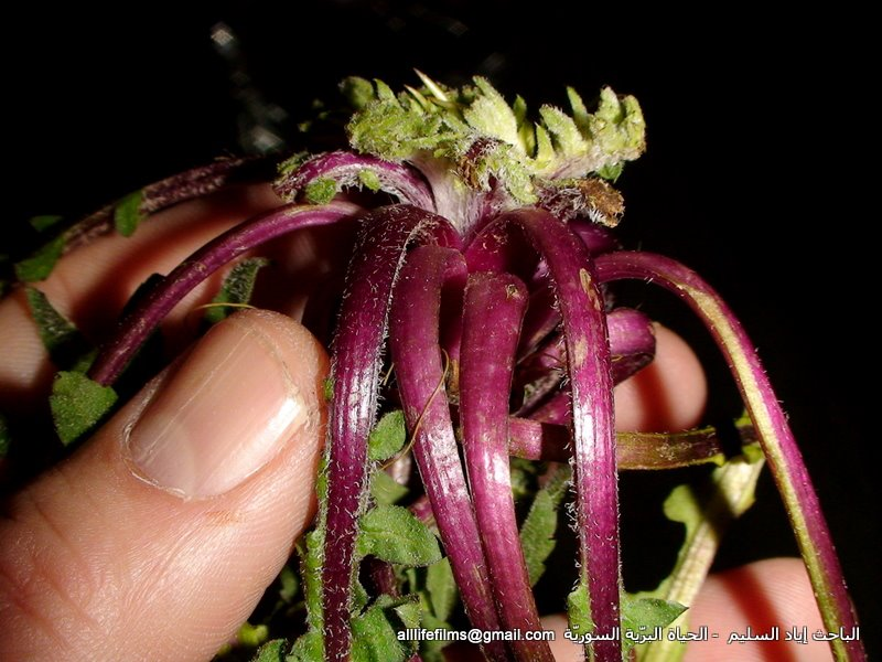 نباتات برية سورية تؤكل